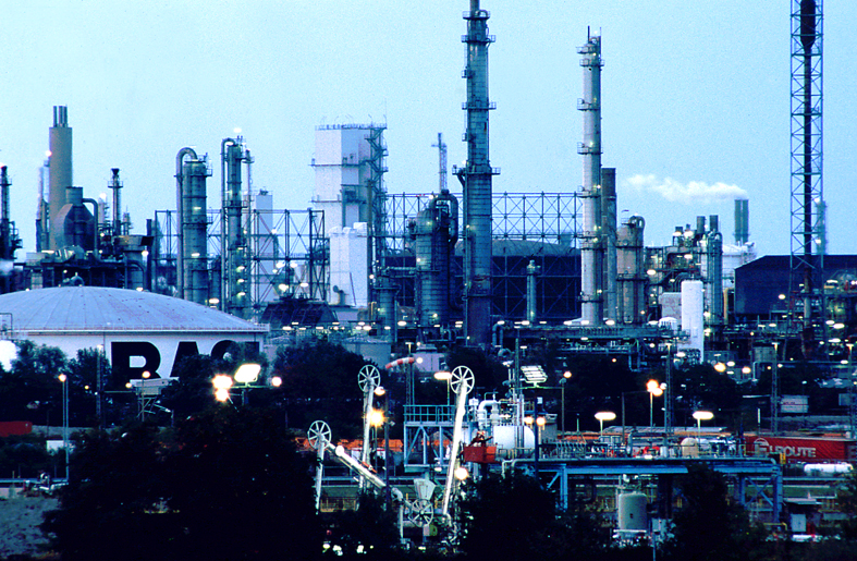 BASF, Ludwigshafen, Deutschland